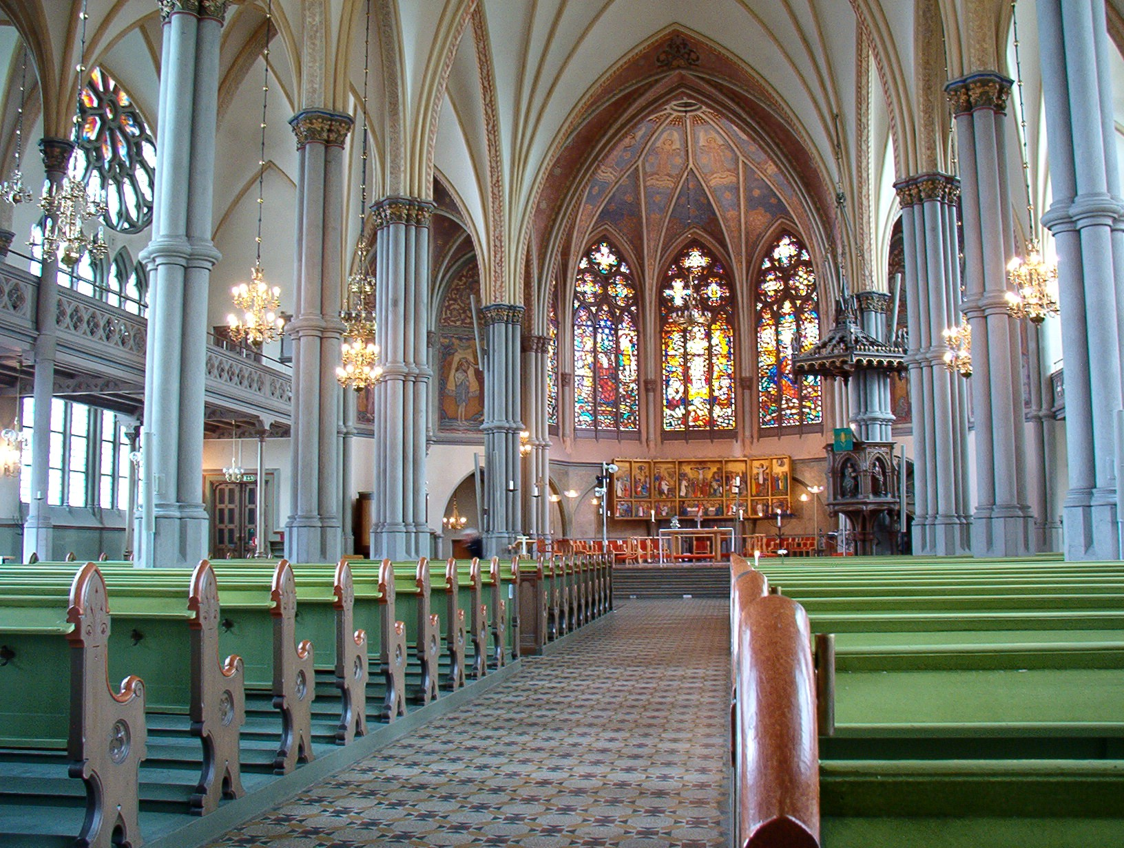 Date August 2005